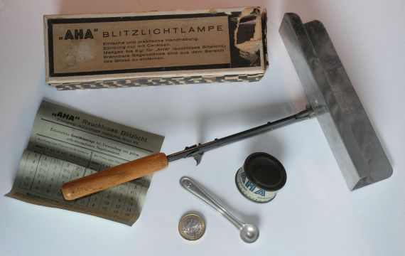 Die AHA Blitzlichtpulverlampe